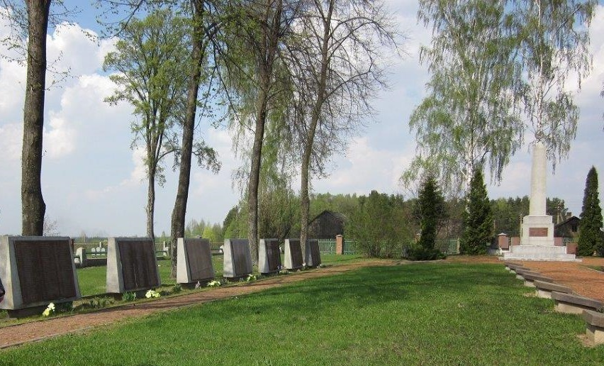 Gräber und Ehrenmal der gefallenen russischen Soldaten in Kudirkos Naumiestis, Litauen.